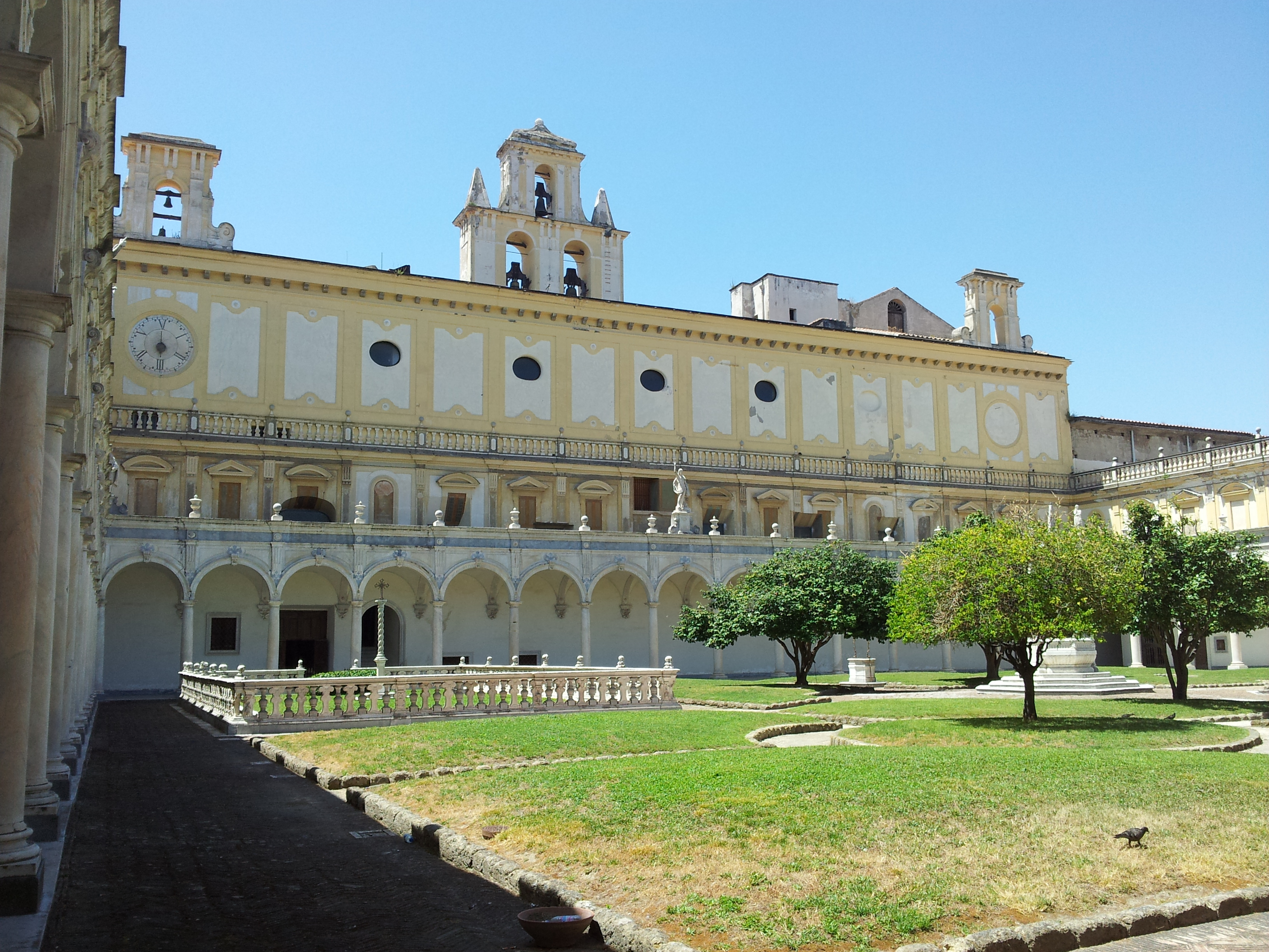 Chiostro di San Martino (Napoli)